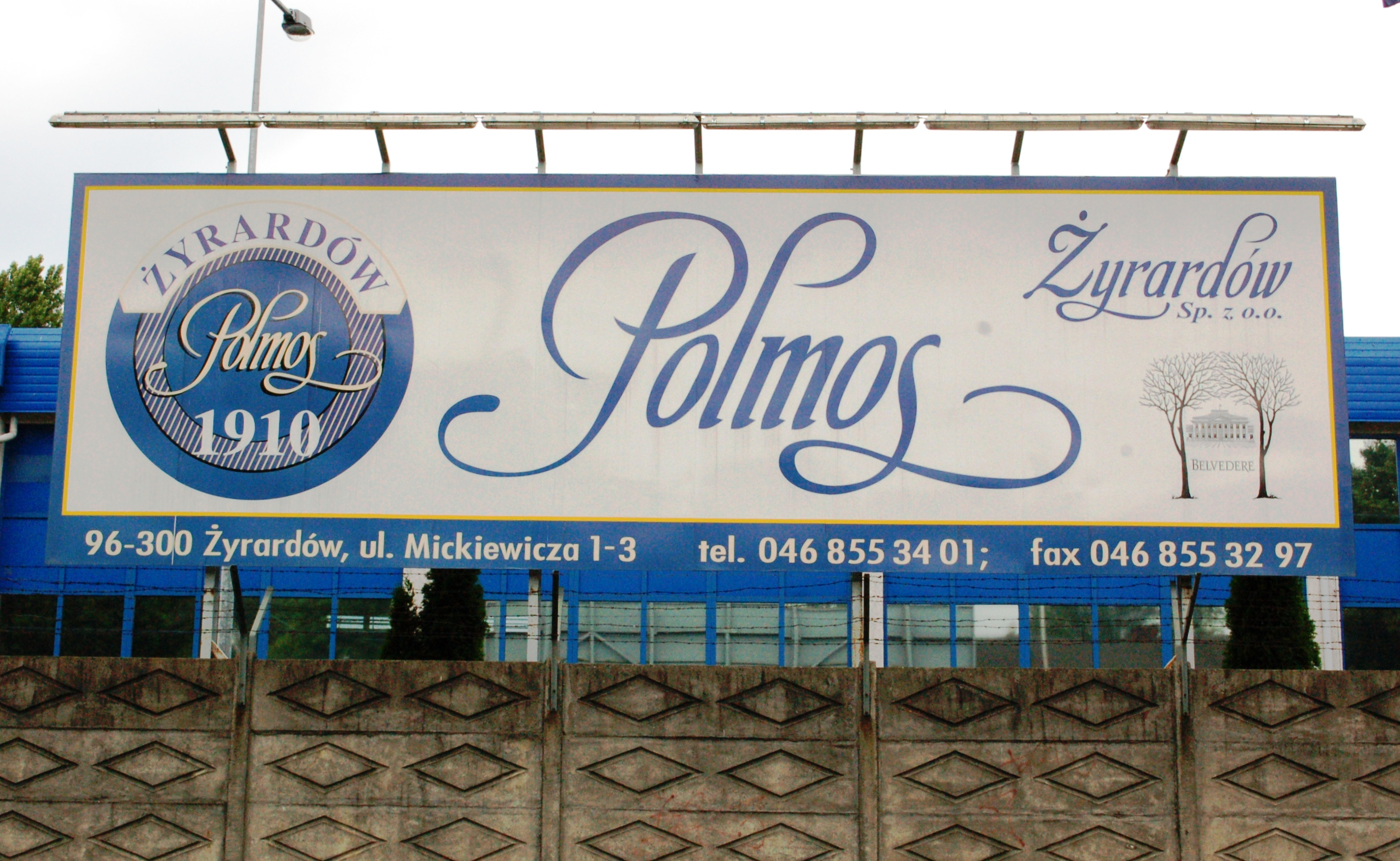 Polen, POLMOS Żyrardów Sp. z o.o.